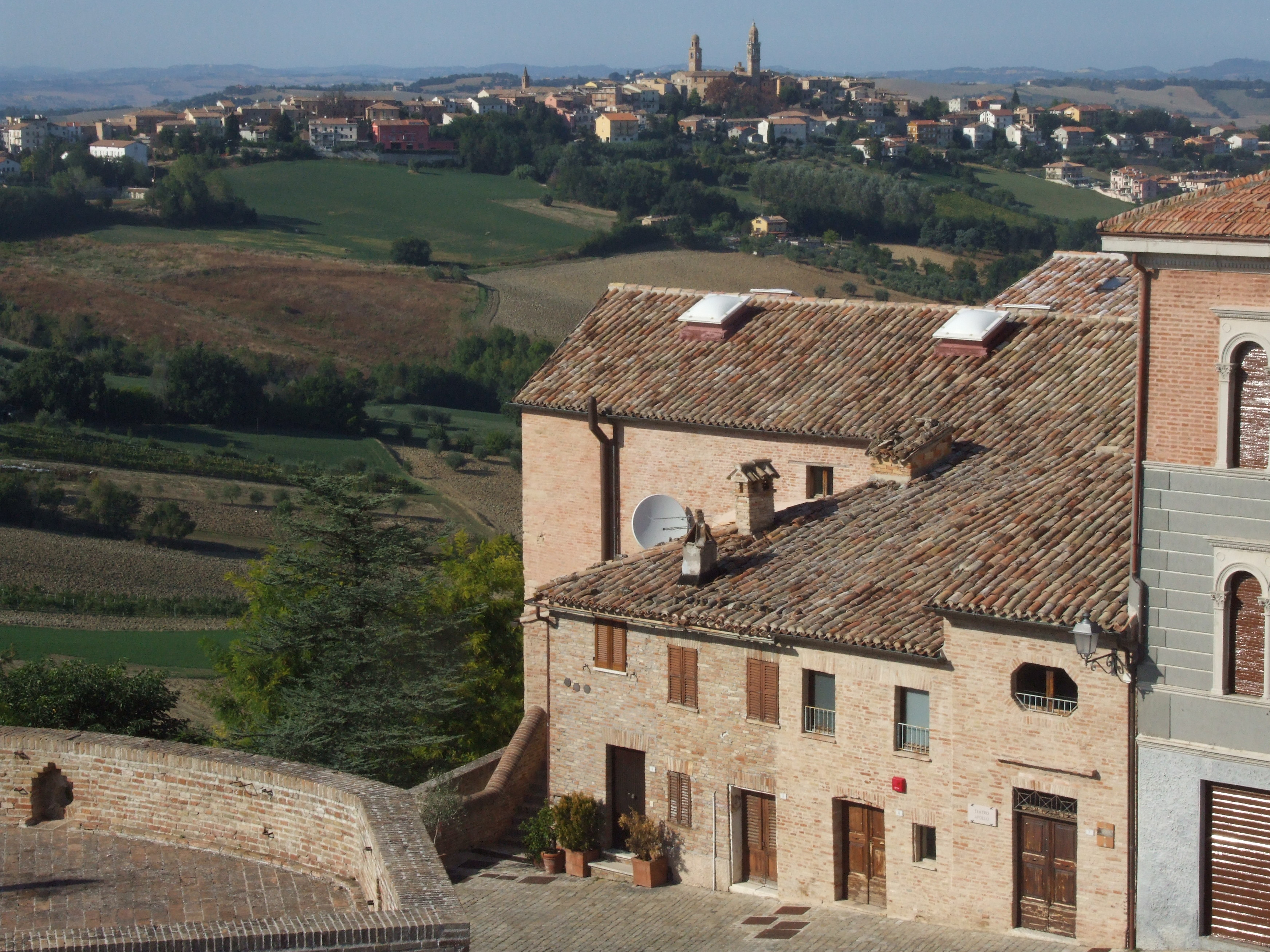 Teatro Apollo visto dal torrione della Rocca Roveresca This is a photo of a monument which is part of cultural heritage of Italy.